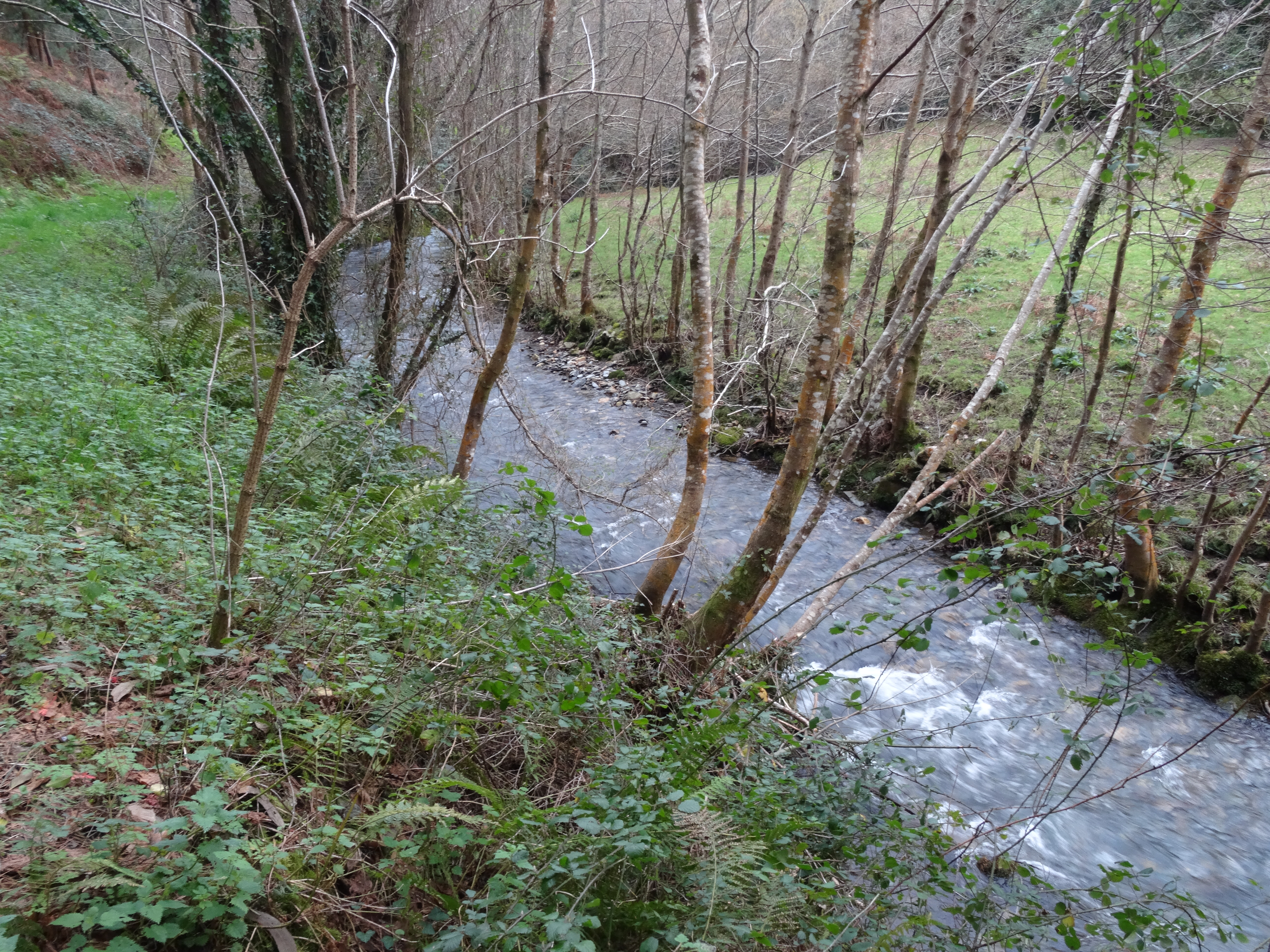 Ver título.